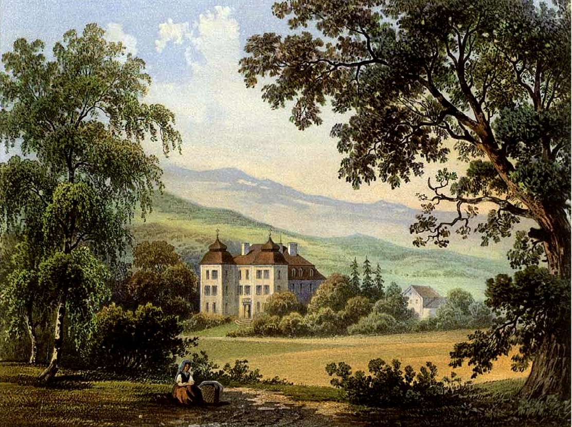 Schloss Lomnitz, Kreis Hirschberg, Provinz Schlesien, Lithografie aus dem 19. Jahrhundert